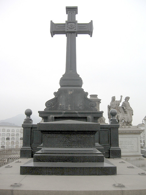 Tumba Manuel Pardo